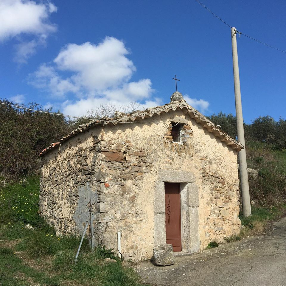 Chiesa rurale di San Mercurio (Shën Merkuri), presso contrada Brinja in Piana degli Albanesi.